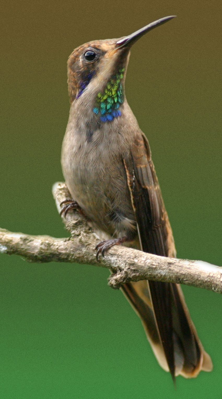 Brown Violet-ear Colibri delphinae Mirador, Rt. 129 Alajuela, Costa Rica